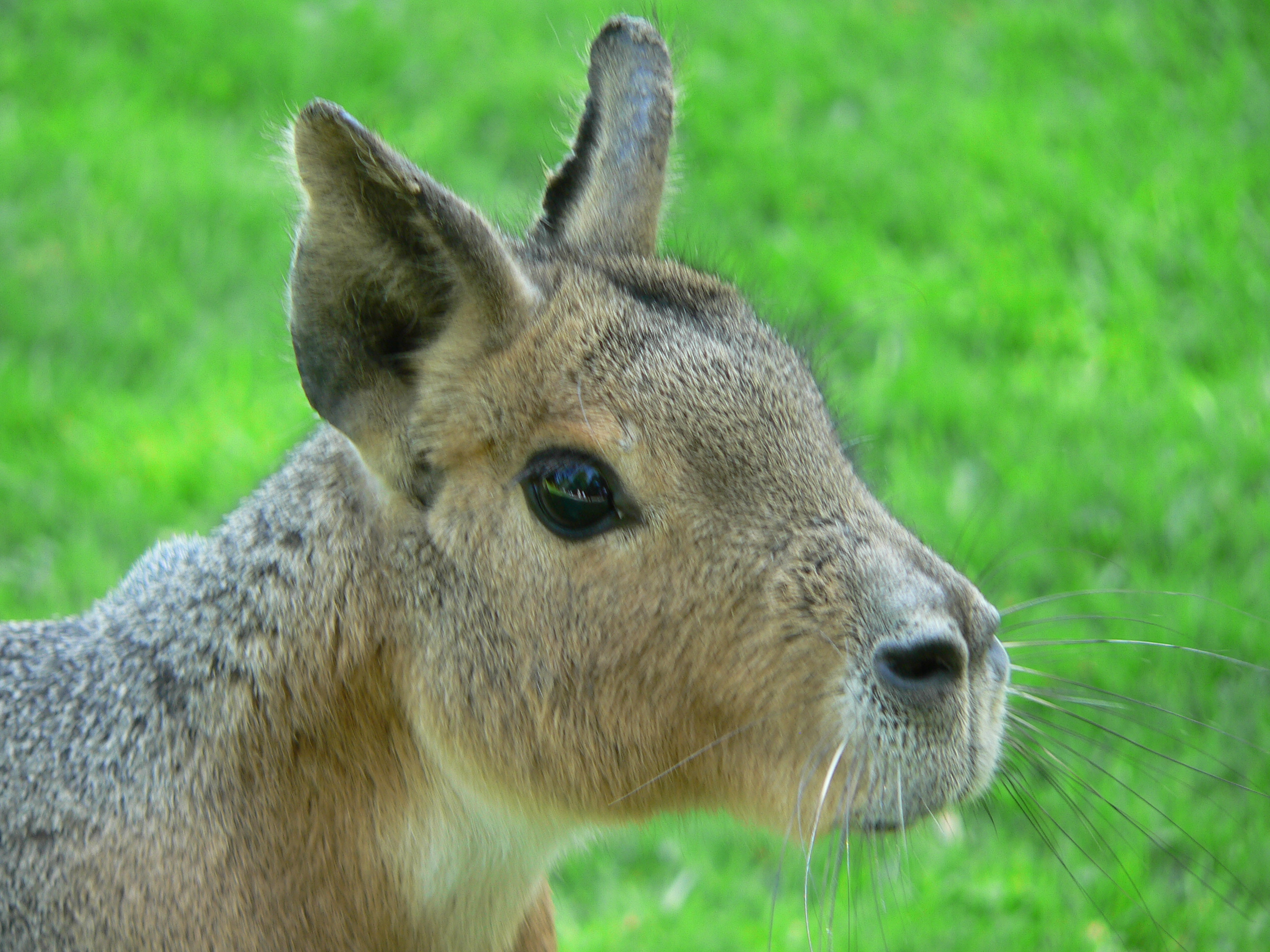 Großer Mara